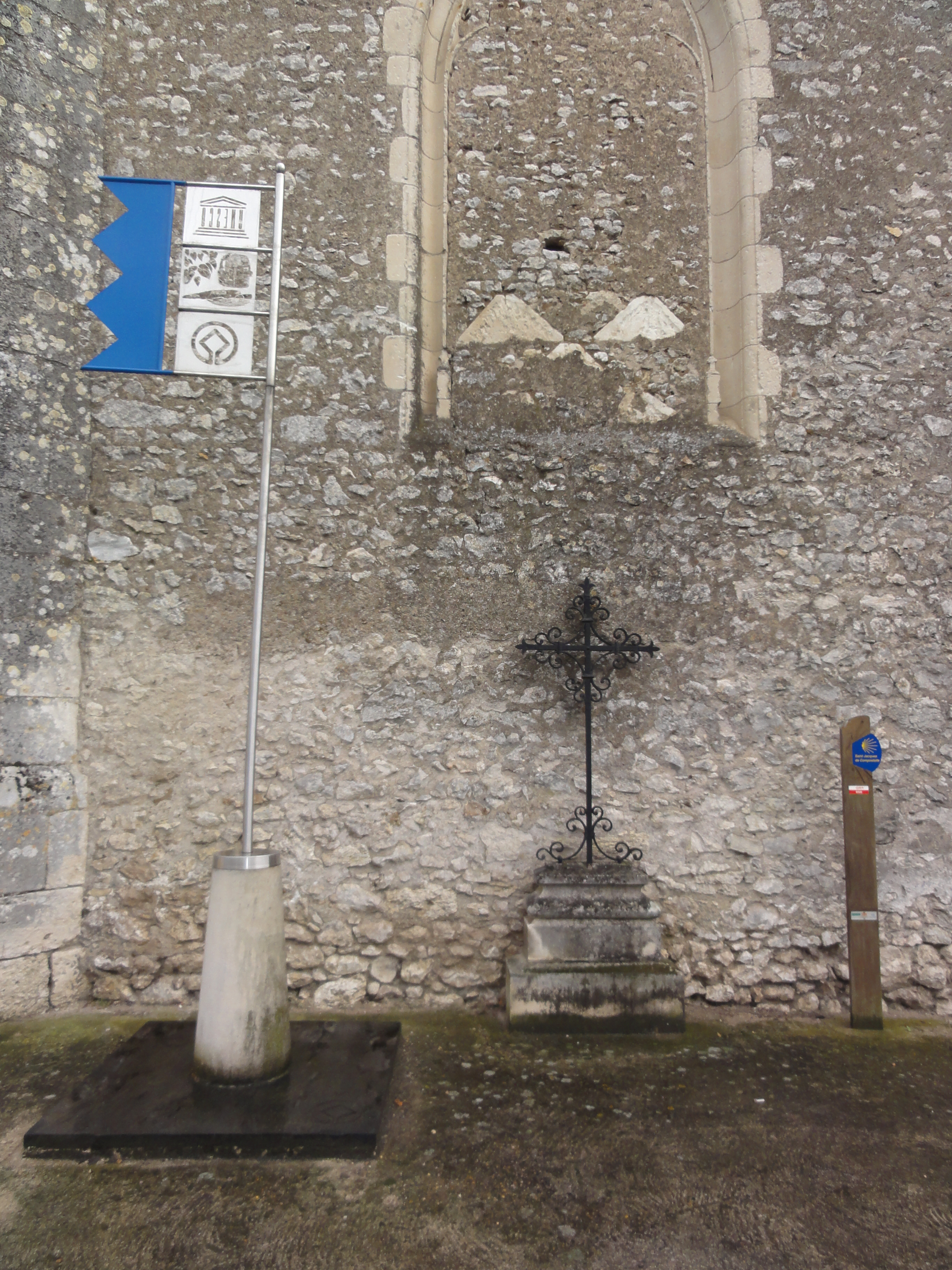 Saint-Claude-de-Diray (Loir-et-Cher) Via Turonensis, croix, Unesco